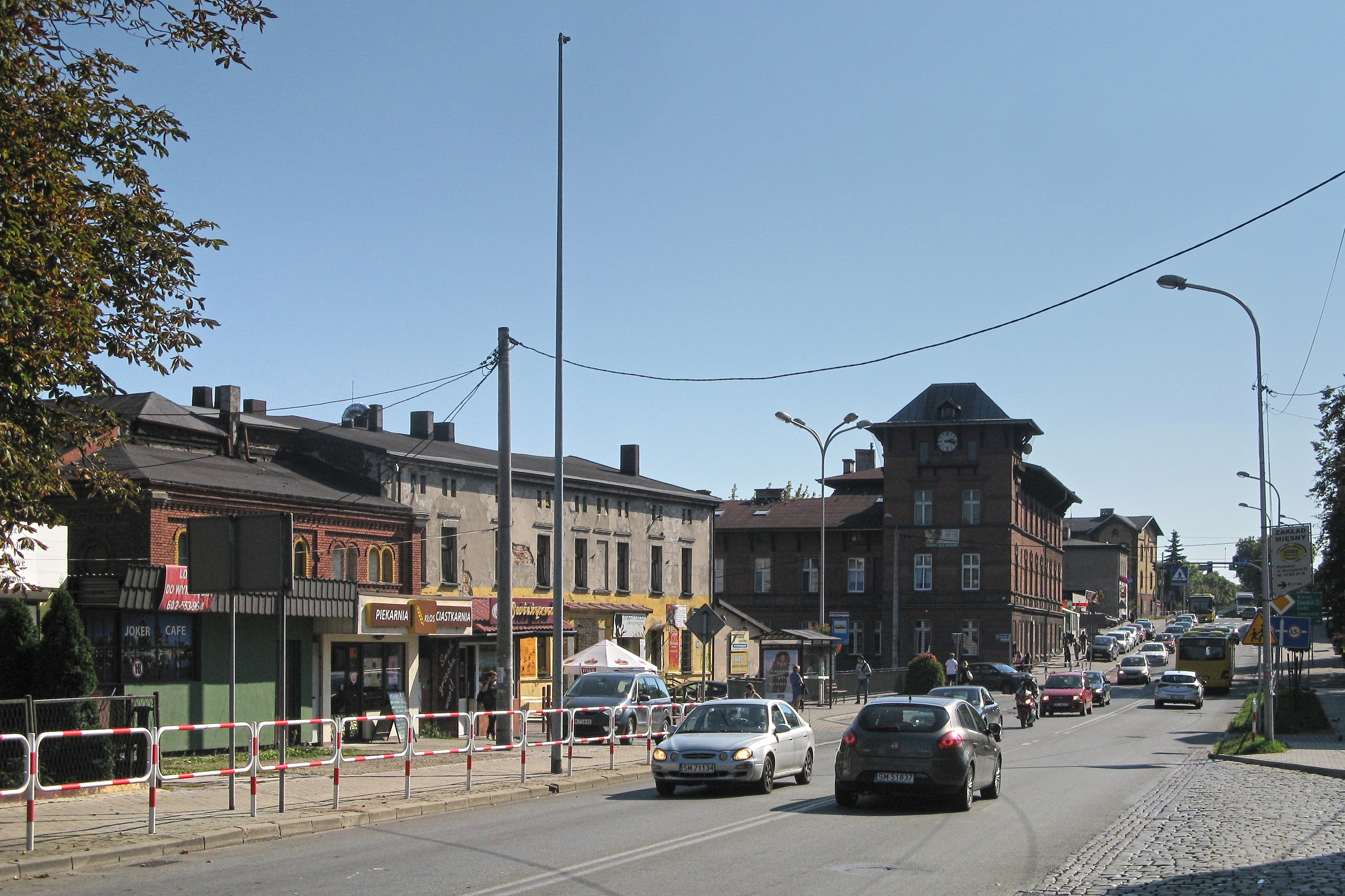 ul. Brzezińska w Mysłowicach-Brzezince, przystanek autobusowy Brzezinka Centrum, budynek z wieżyczką pod numerem 21 to dawna siedziba gminy Brzezinka